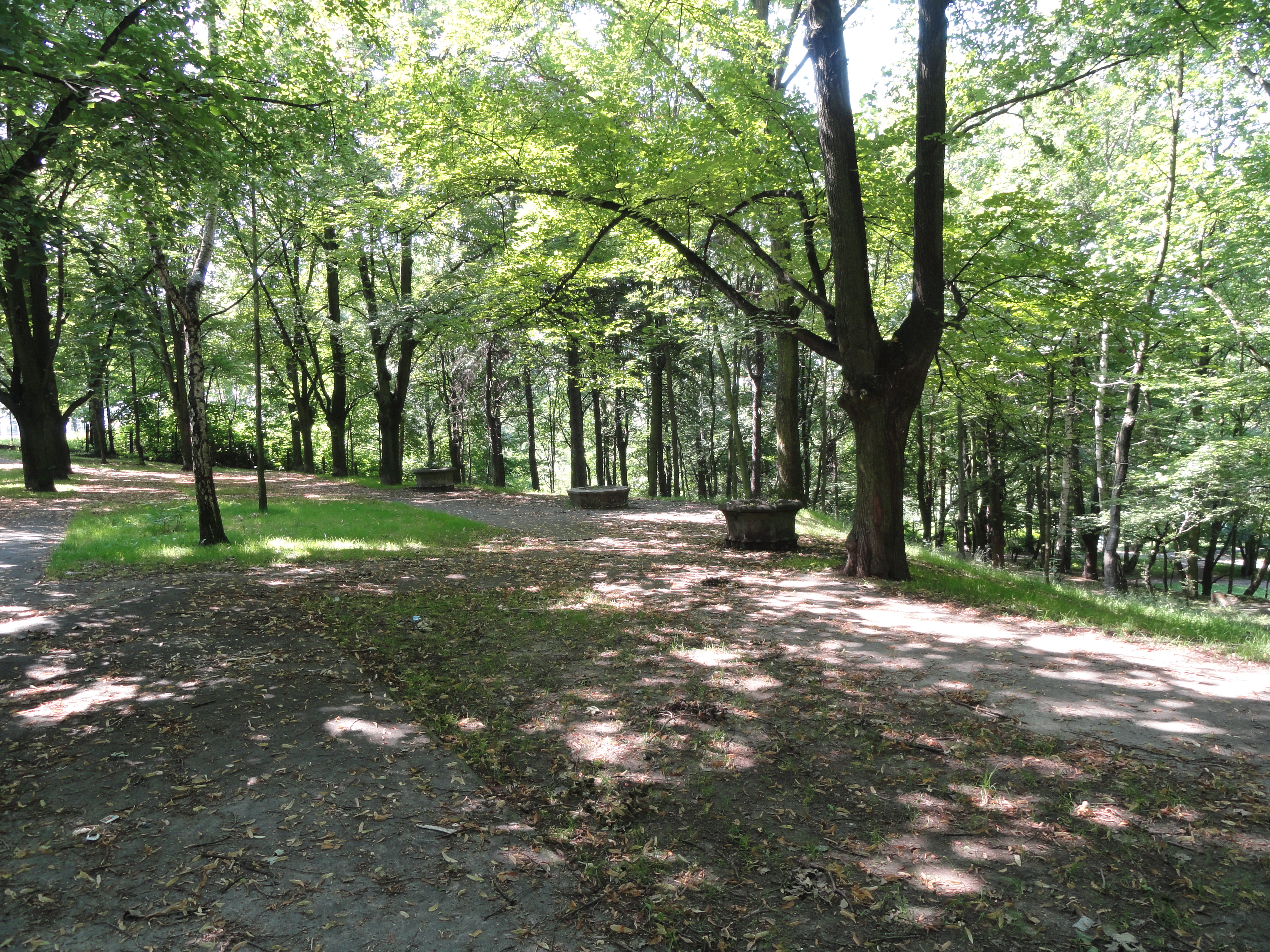 Ehemaliges Rosarium im Park Andrzeja Błachańca (einst Feldberggarten im Georg-Snay-Park) in Zgorzelec